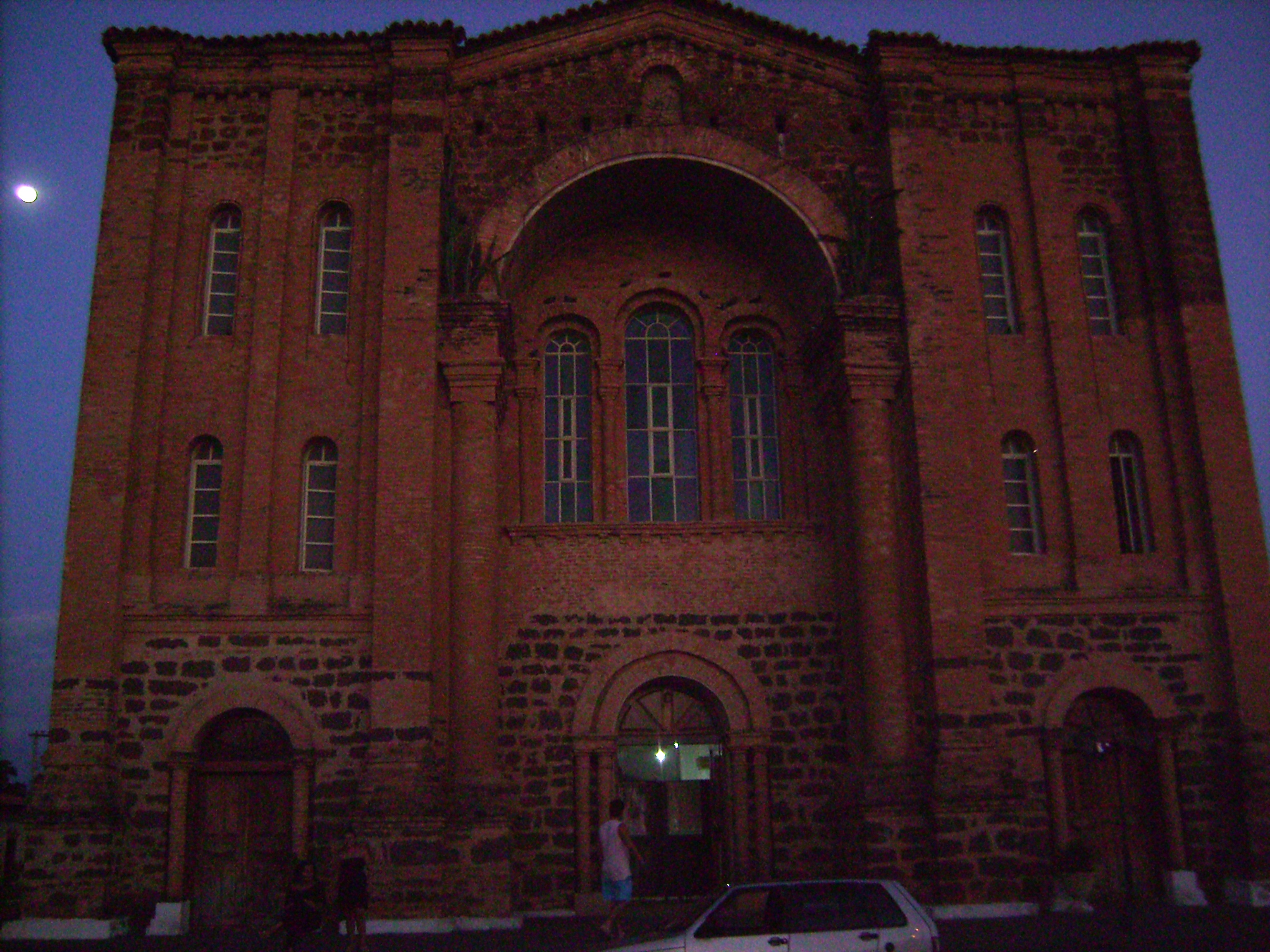 Catedral de Nossa Senhora das Mercês, Porto Nacional, Tocantins, Brasil.